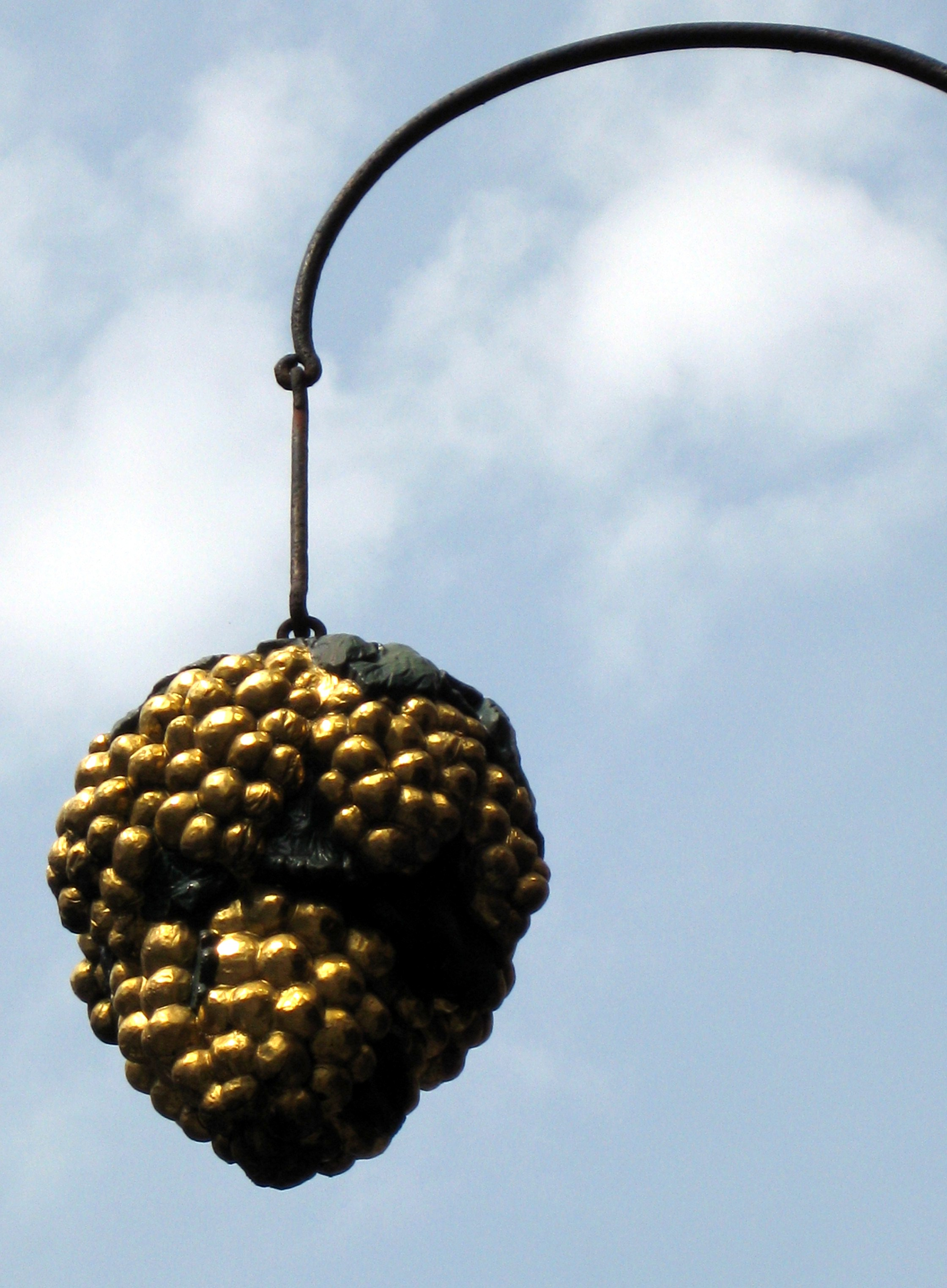 Weintraube als Nasenschild der Weinhandlung von Melle in der Beckergrube in Lübeck.